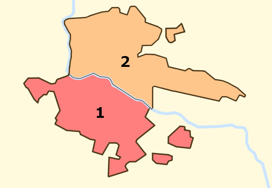 Административное деление Гродно